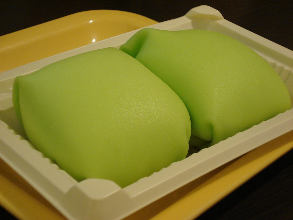 Two durian pancakes.